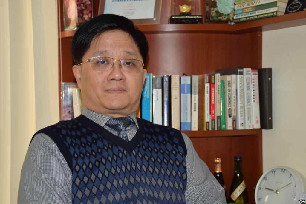 香港經濟學者關焯照。